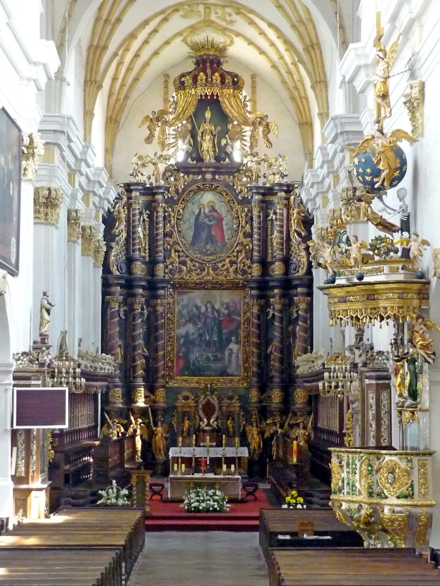 Kościół parafialny pw. Wniebowzięcia Najświętszej Marii Panny w Koronowie.